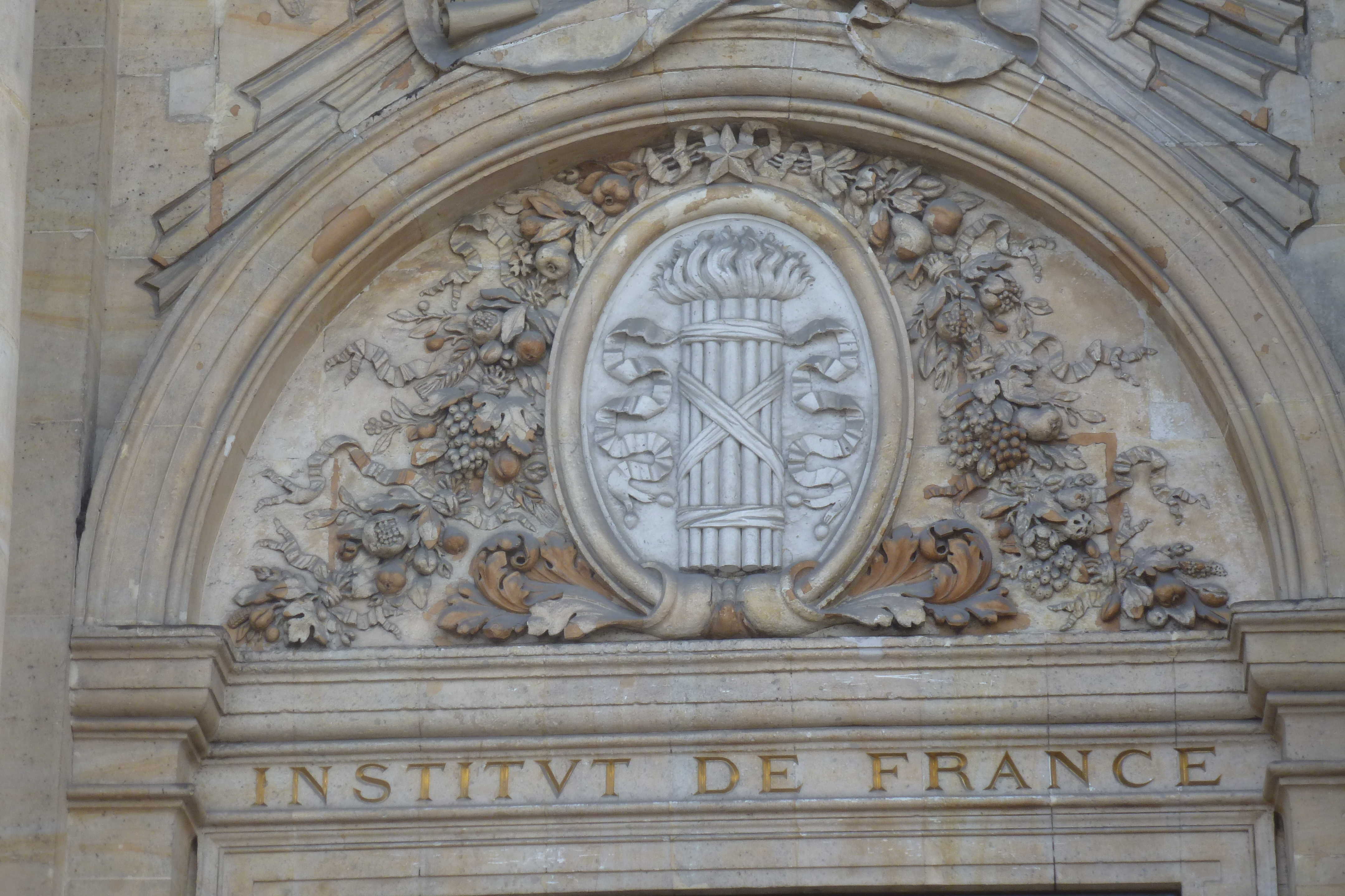 Frontispice en haut de la porte de l'Institut de France, à Paris.